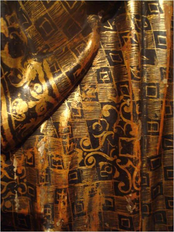 Llit